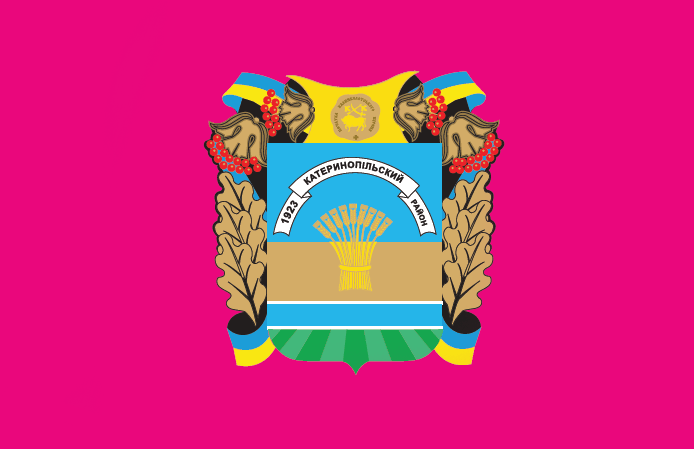 Прапор Катеринопільського району